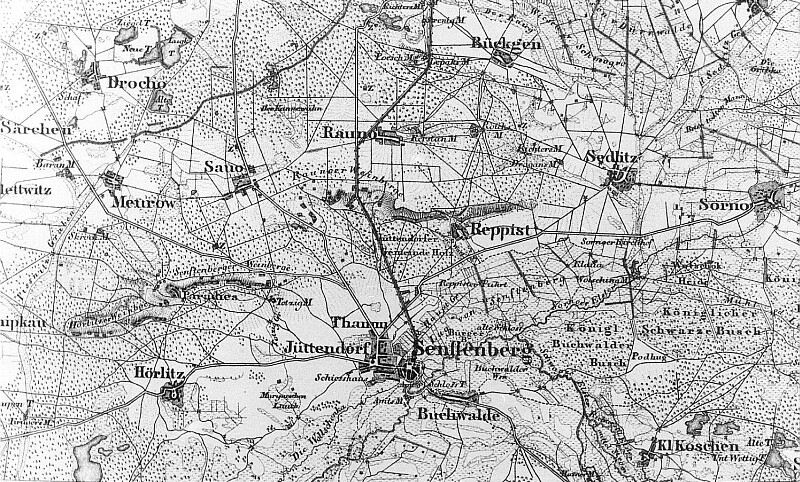 Original image description from the Deutsche Fotothek Schipkau-Meuro. Topographische Karte vom Preußischen Staate, Blatt 233 Alt Döbern, grav. 1850